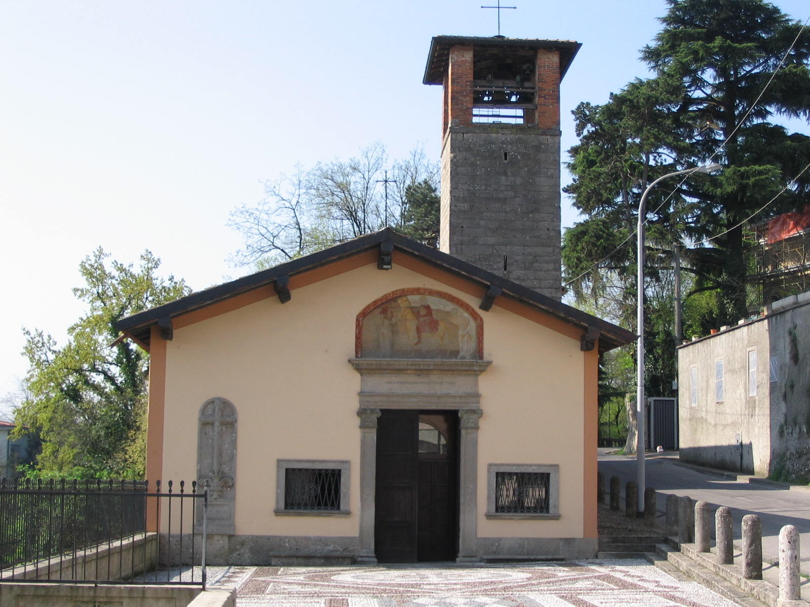 di San Vittore di Brembate, nel comune di Brembate.